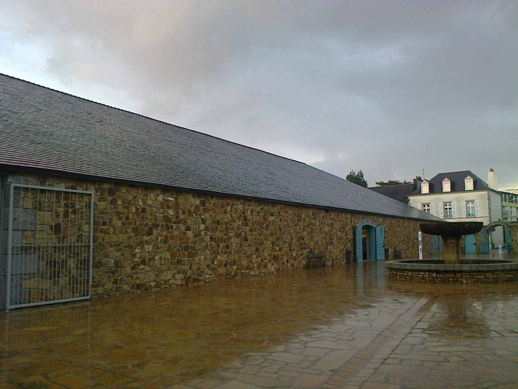 Domaine des Capucins Landerneau ; cour intérieure et ancien magasin Leclerc, transformé en espace d'expositions du Fonds Hélène et Edouard Leclerc pour la culture, ouvert en 2012. This building is en partie classé, en partie inscrit au titre des Monuments Historiques. .